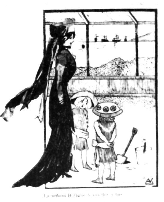 Ilustración de Abraham Valdelomar para su novela “La ciudad muerta”, publicada por entregas en una revista limeña. Representa a la señora Bretigne y sus dos niñas.